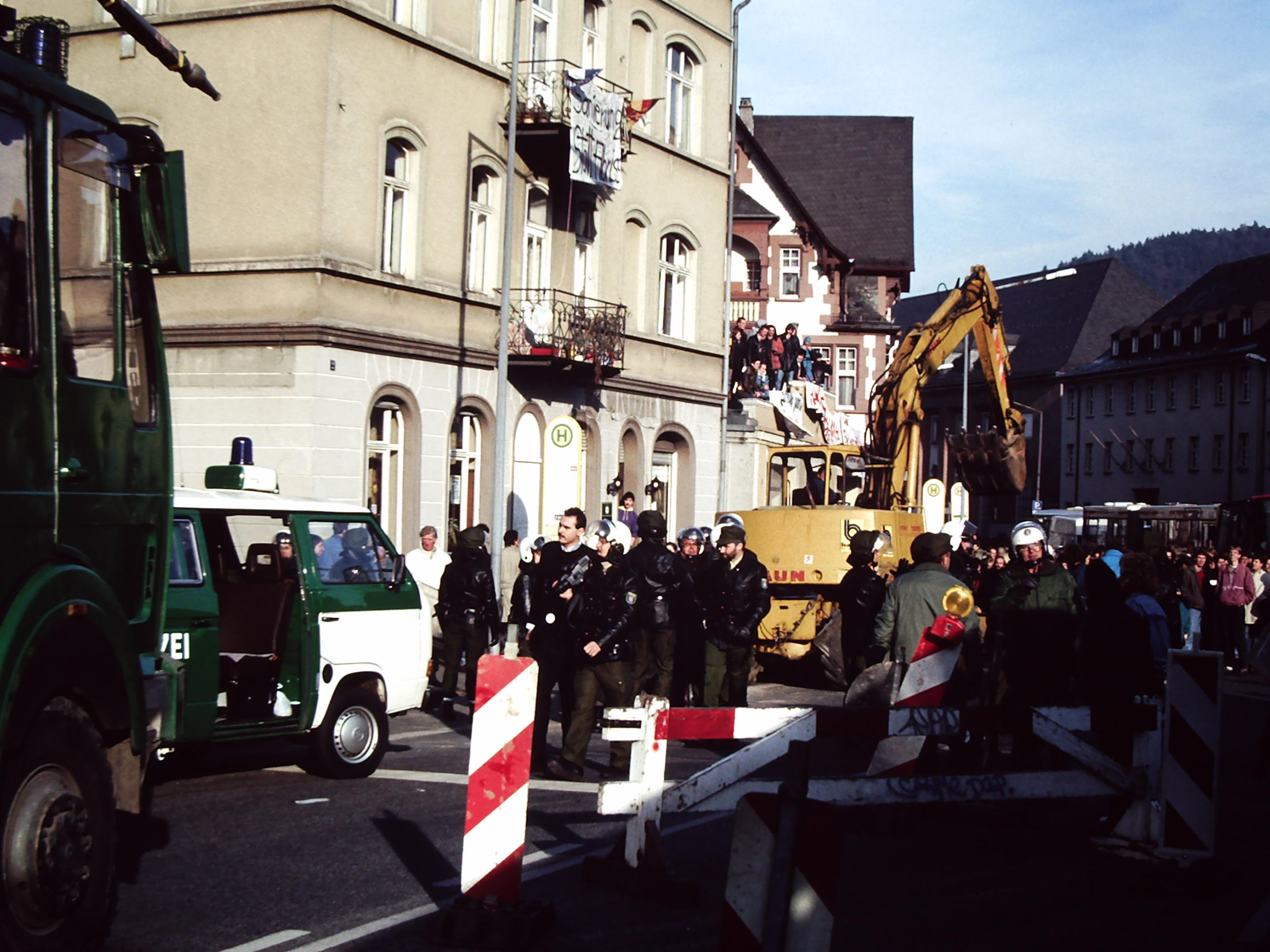 Studentenproteste und Polizeieinsatz beim Abriss der Häuser am Biegeneck, Marburg an der Lahn, Hessen